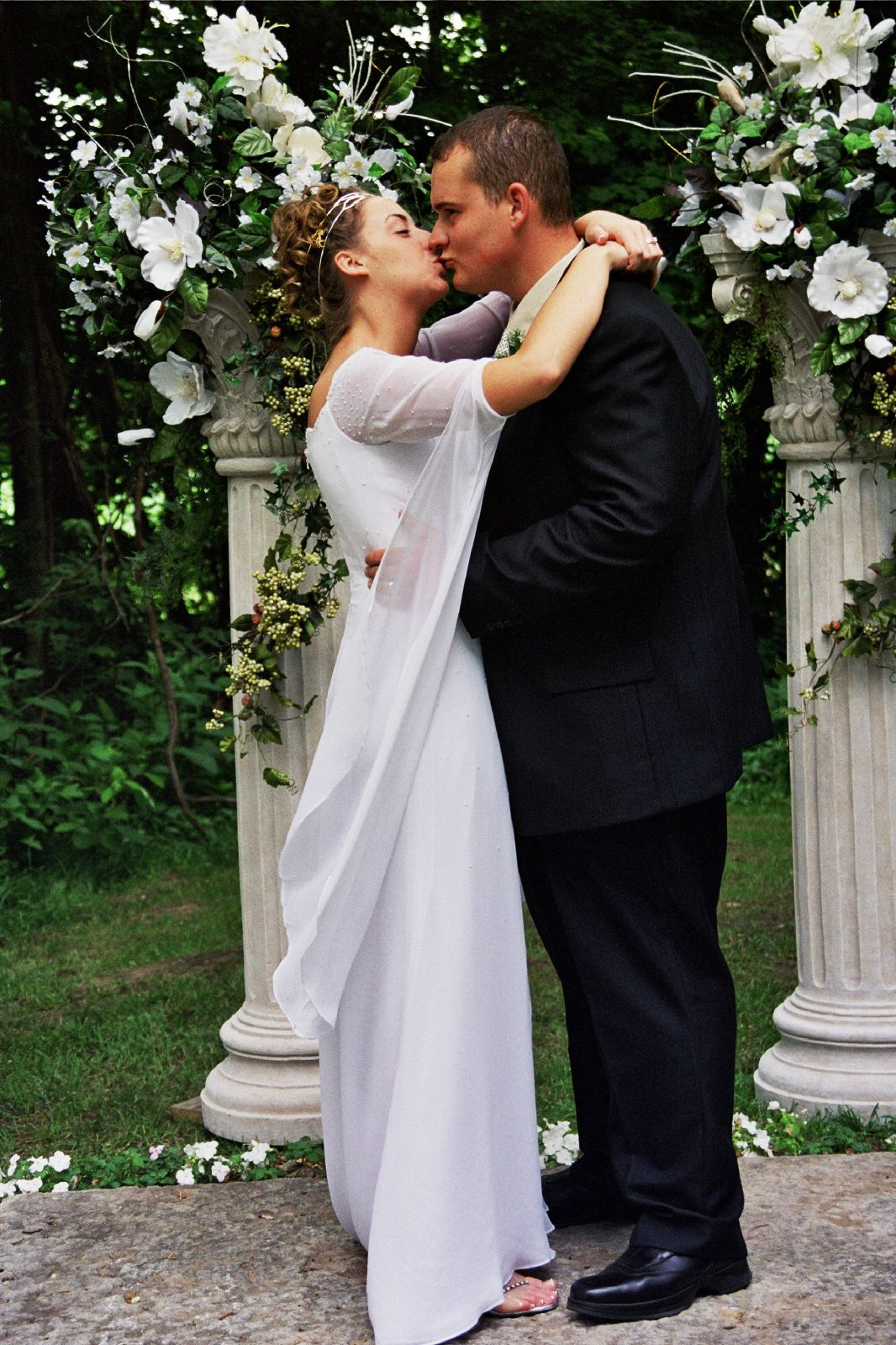 Unha aperta entre noivos e mais un bico.